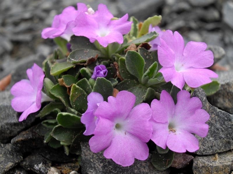 Primula allionii 'HNG12'